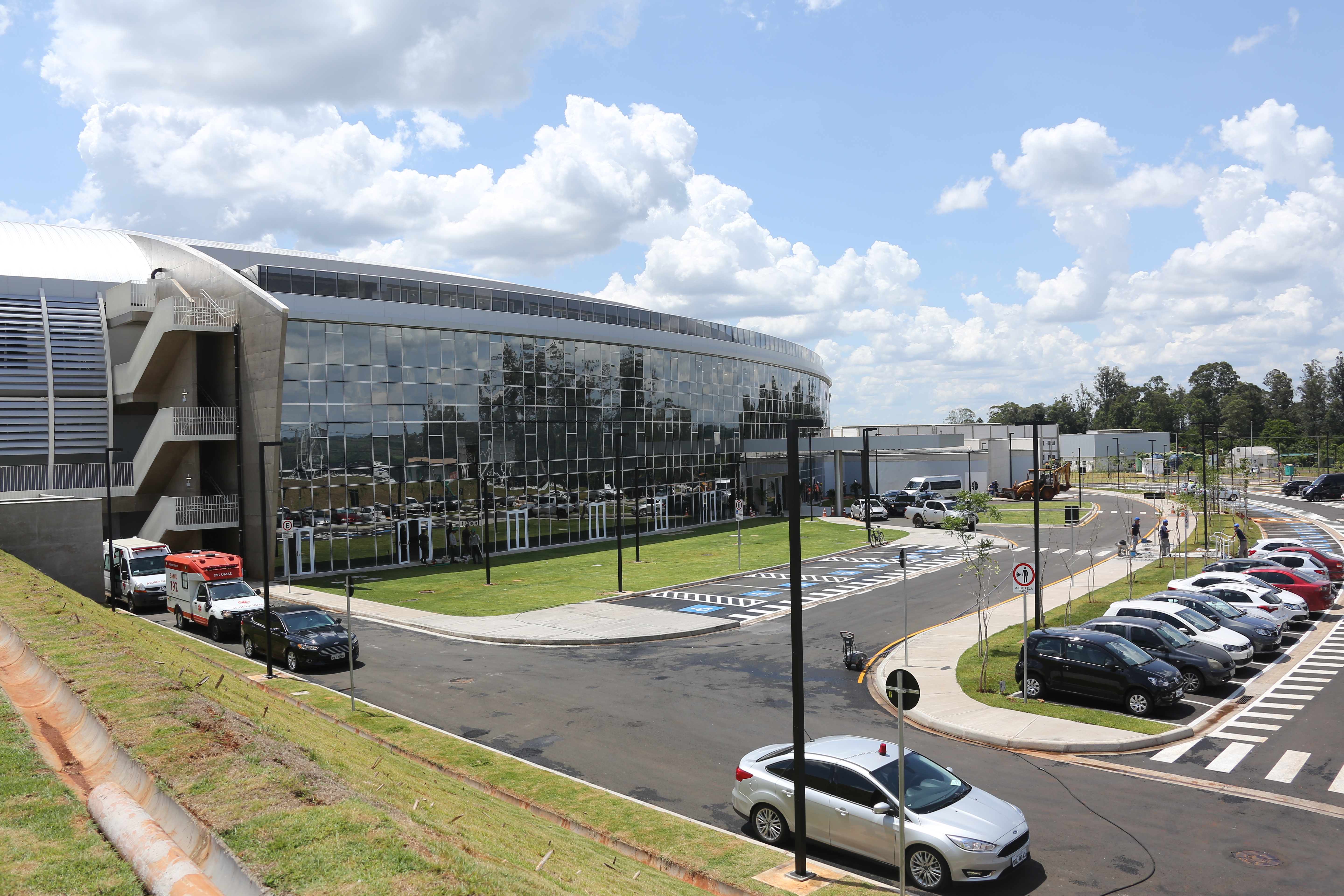 14/11/2018. Campinas-SP. Ministro da Ciência, Tecnologia, Inovações e Comunicações, Gilberto Kassab, participa da inauguração do acelerador de partículas Sirius. Foto: Bruno Peres/MCTIC.